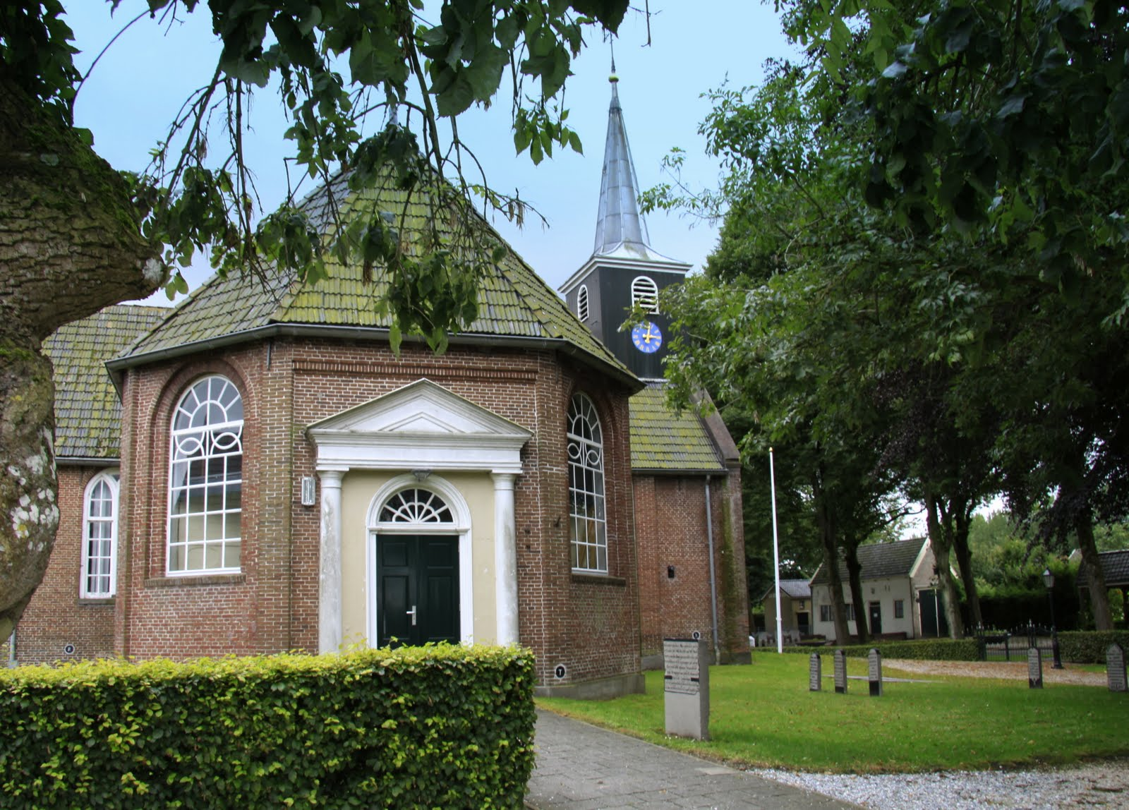 Aengwirder Tsjerke Tjalleberd